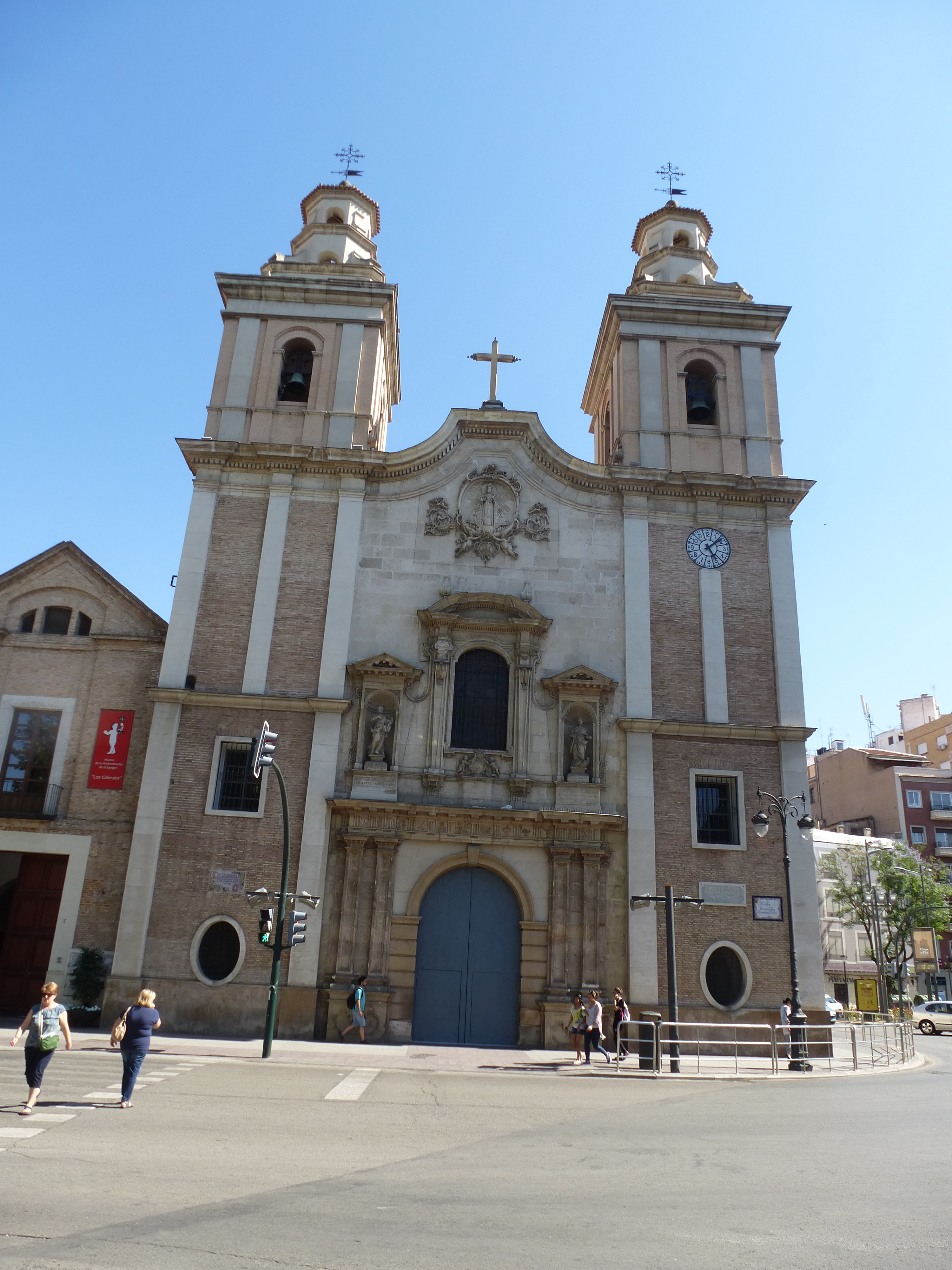 iglesia del carmen